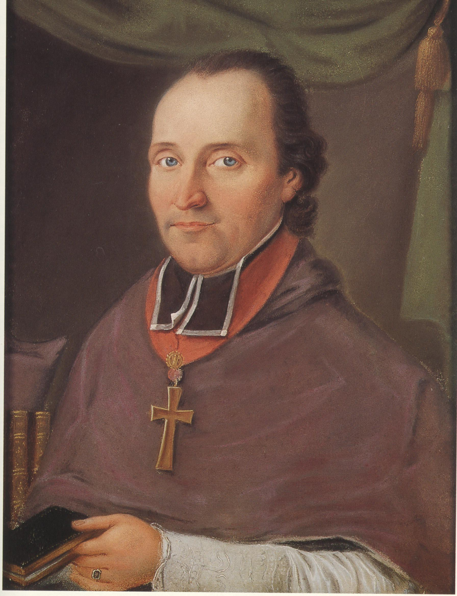 Weihbischof Gregor Zirkel von Würzburg, ernannter Bischof von Speyer